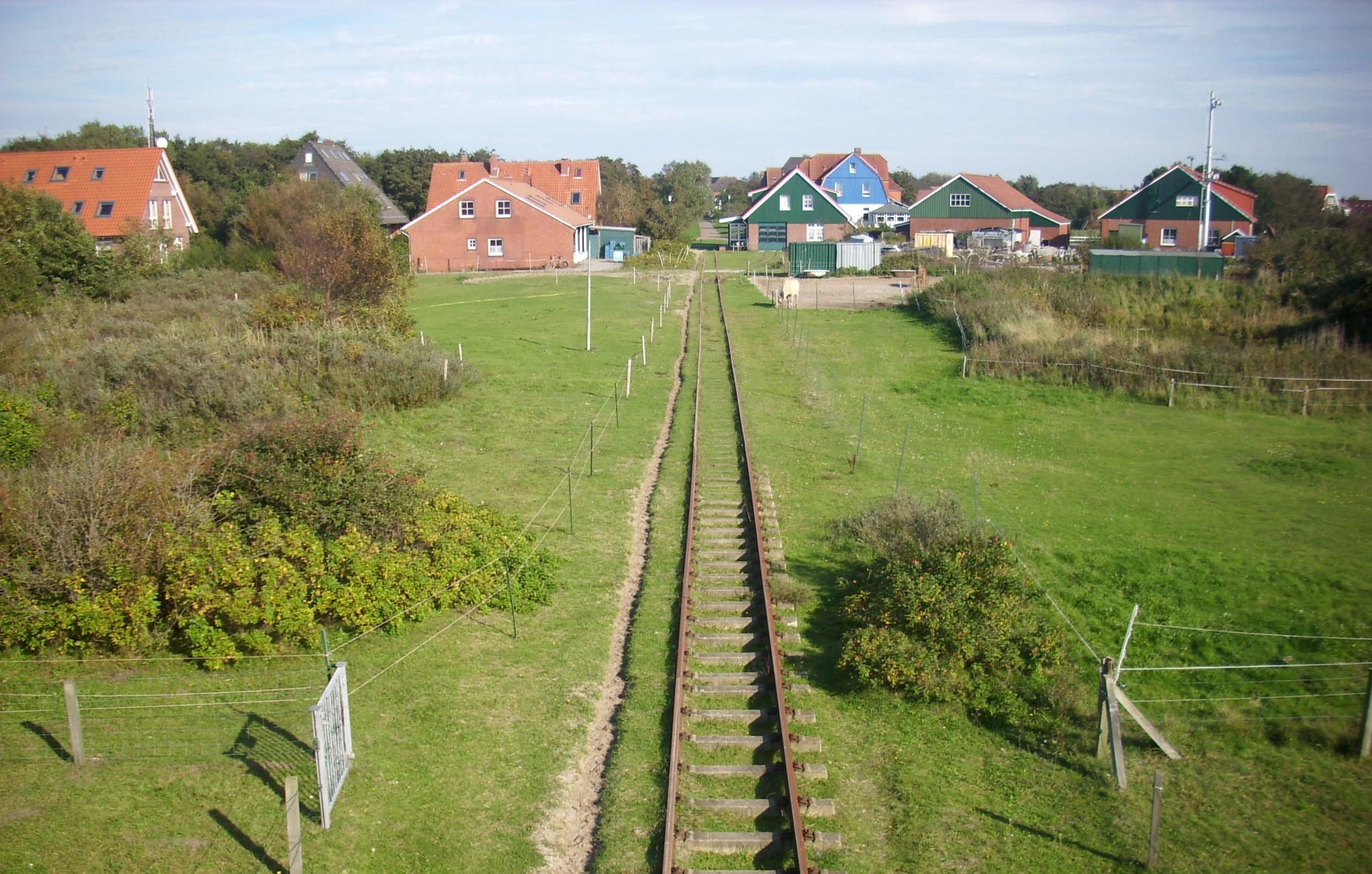 Spiekerooger Inselbahn, Blick vom Deich auf den ehemaligen Bahnhof im Inseldorf